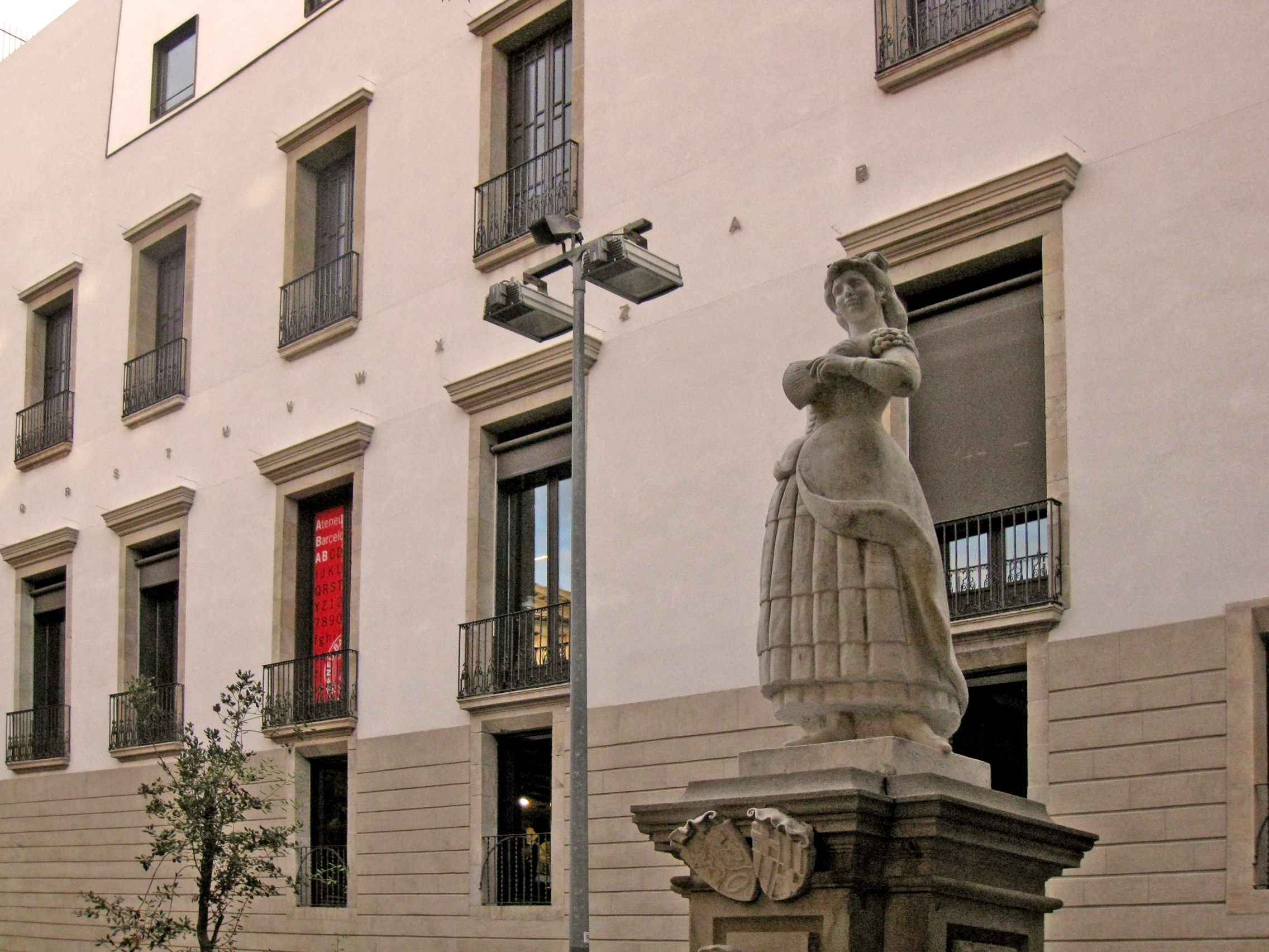 El palau Savassona, de 1796, seu de l'Ateneu Barcelonès des del 1906. La façana que dóna a la plaça de la Vila de Madrid d'ençà de la darrera remodelació.